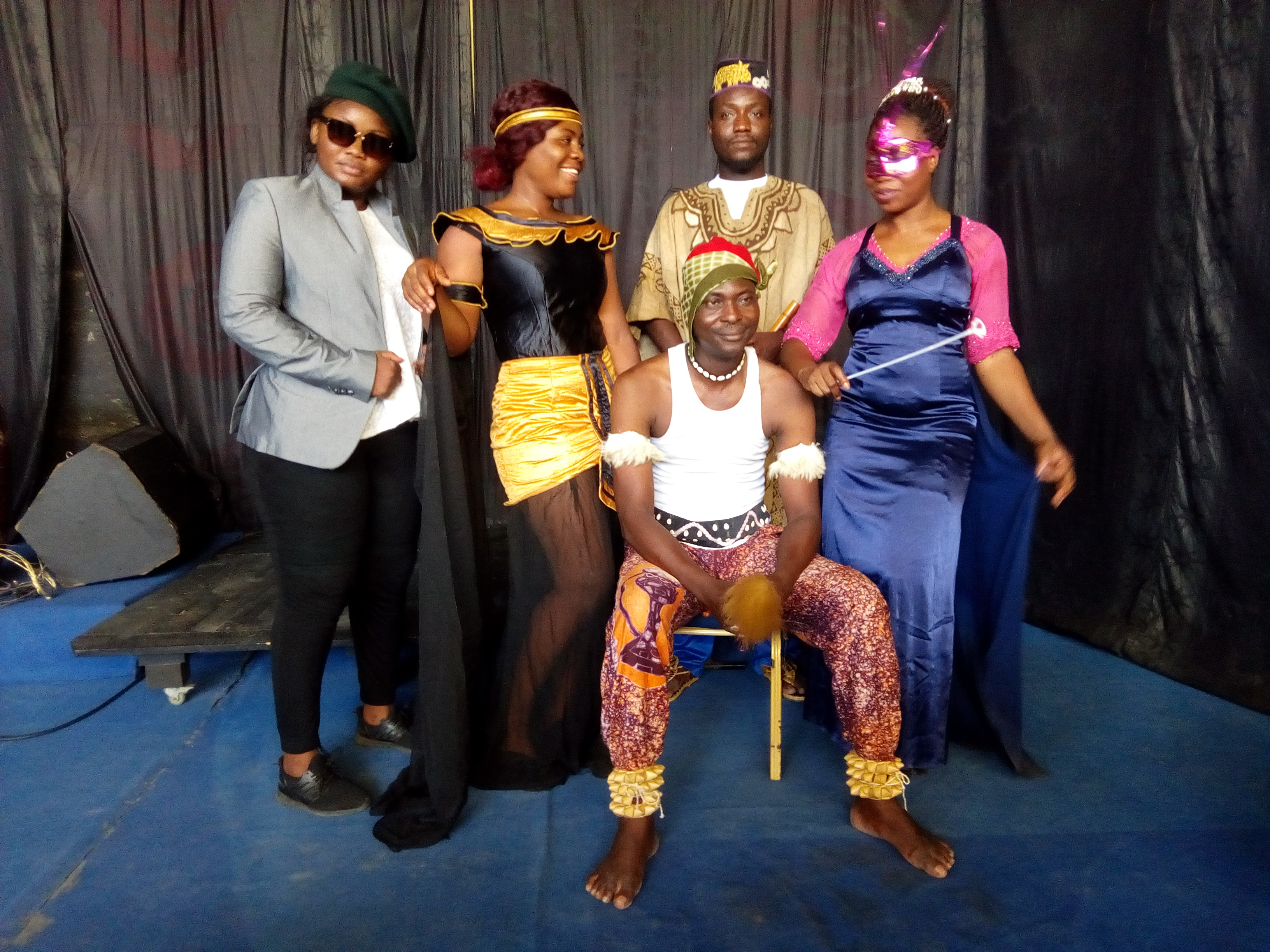 Troupe de théâtre Africa Sound City